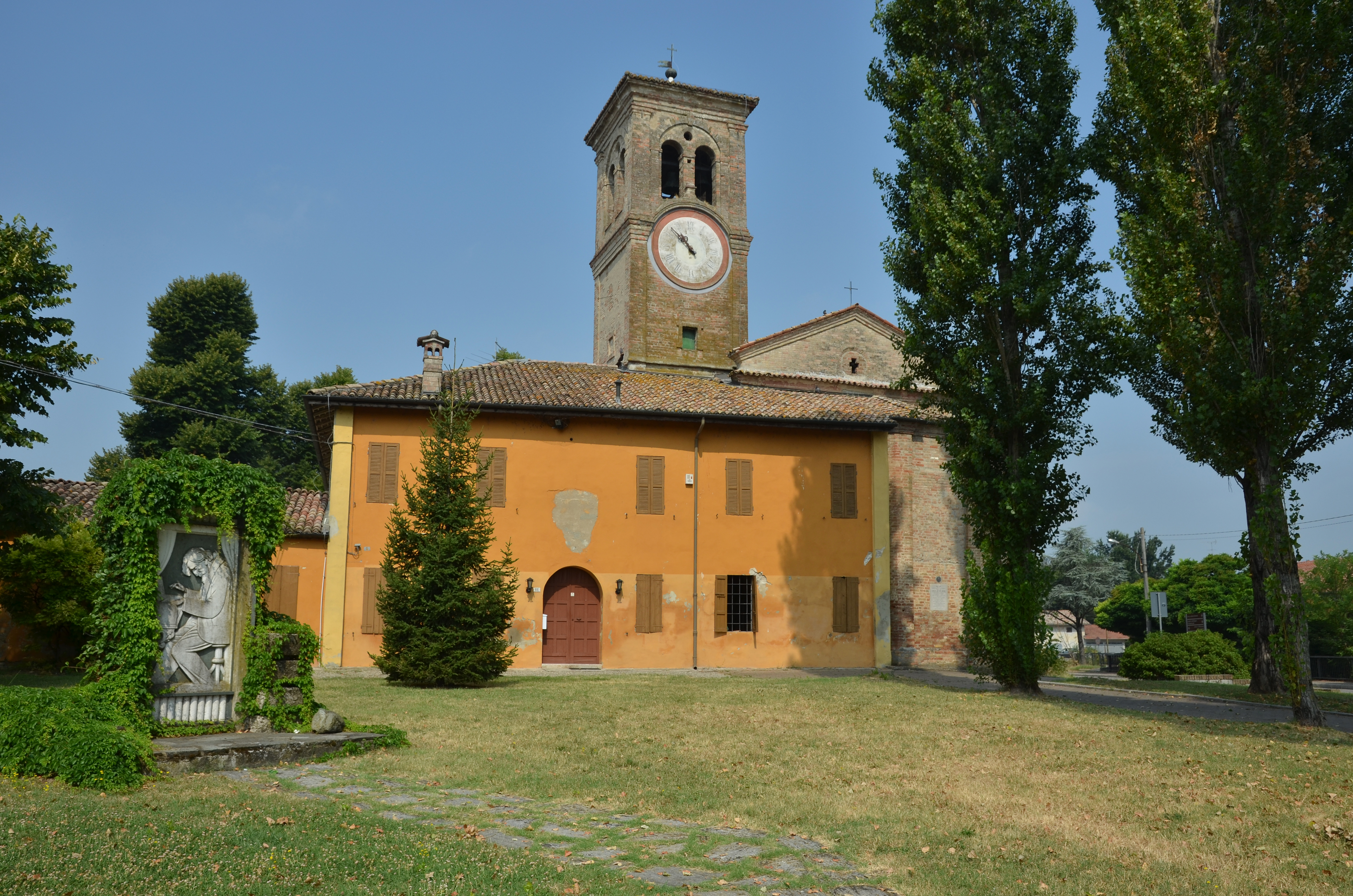 Roncole - kostel, kde se Verdi učil hrát na varhany - Itálie